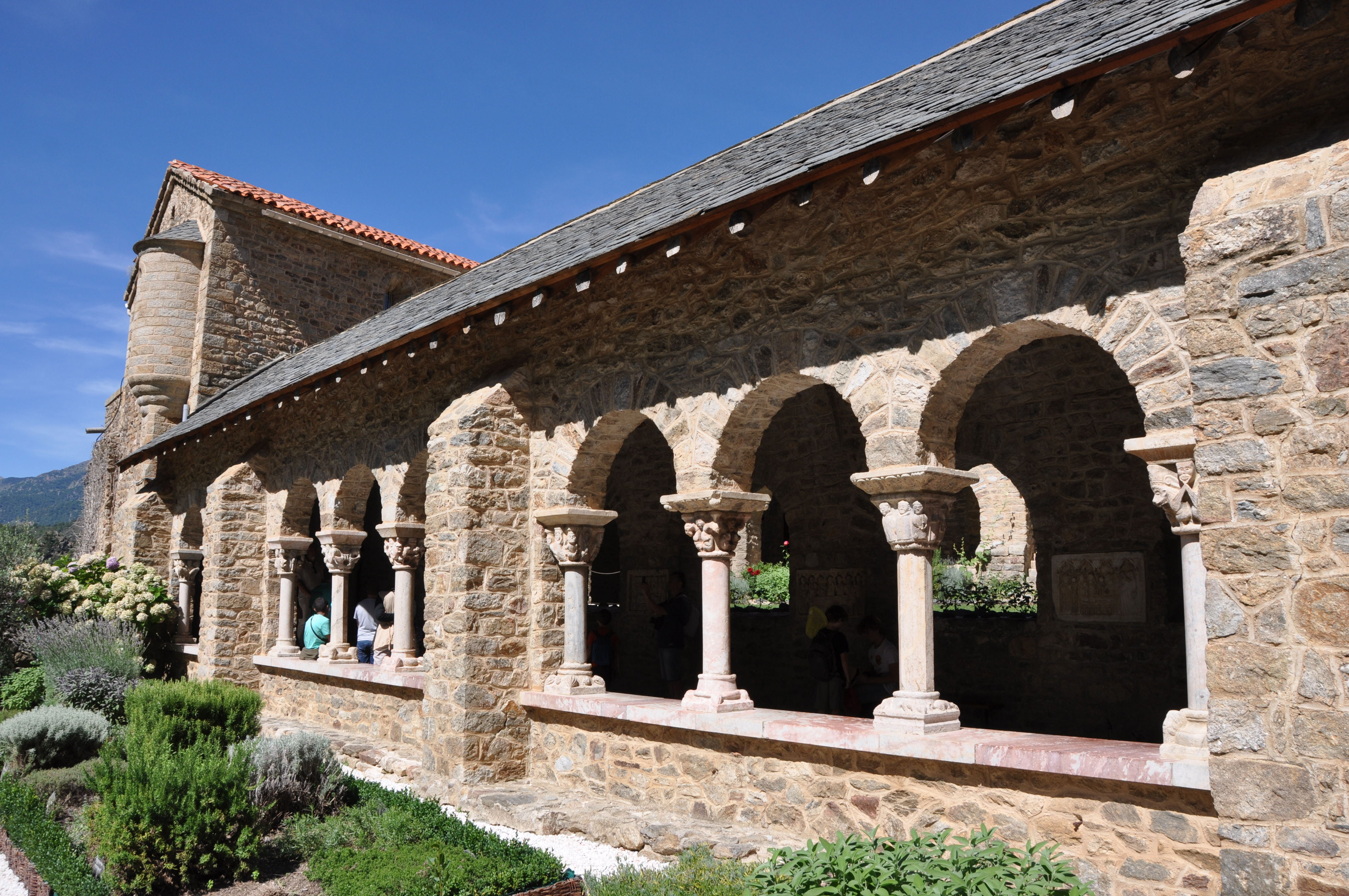 Castell de Vernet. St Martí del Canigó Abbey. Cloister. 11th C. (rebuilt)